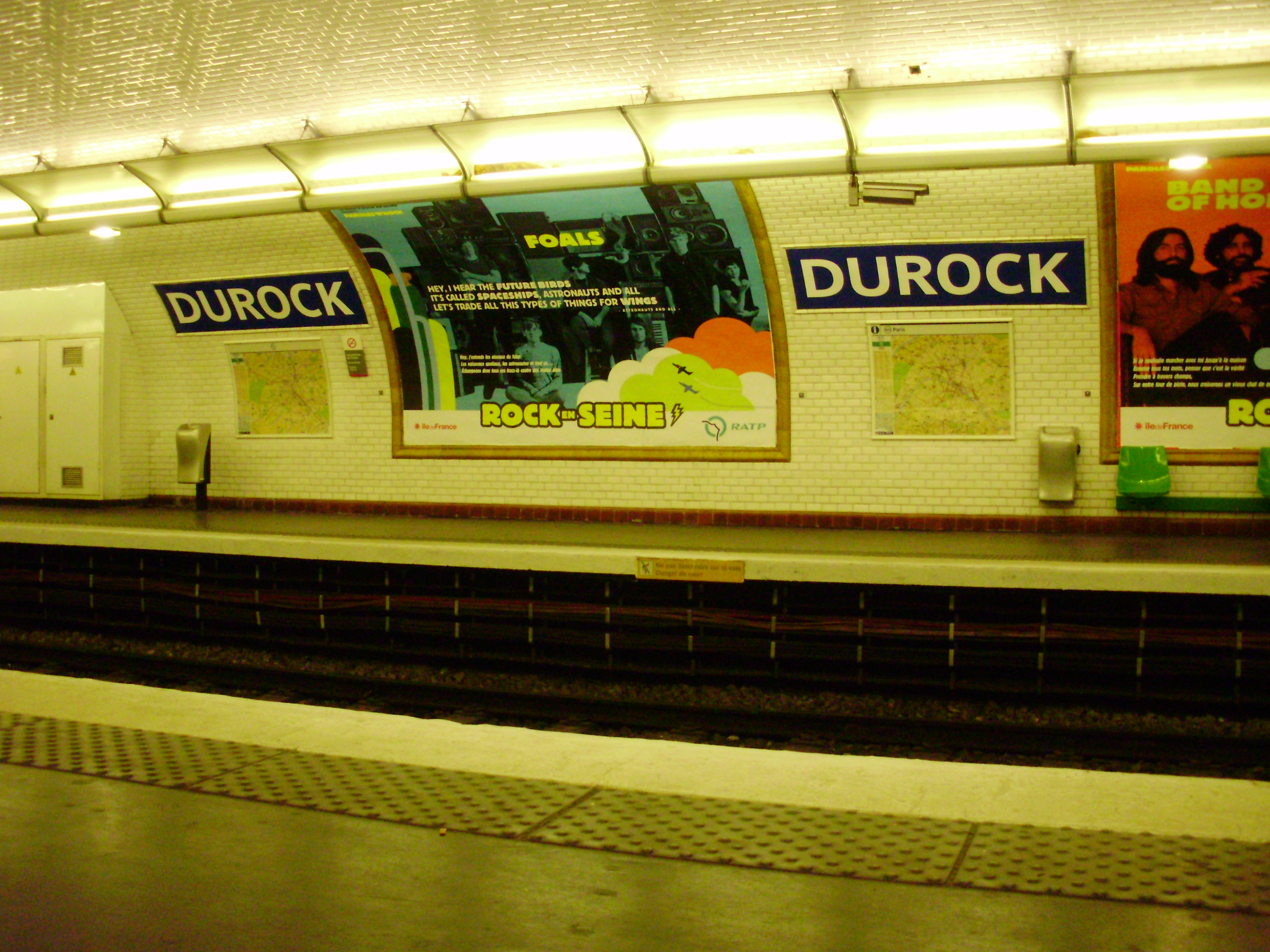 Quai de la ligne 10 de la station Duroc du métro de Paris, direction Boulogne, portant un nom modifié (Durock) temporairement pendant le festival « Rock en Seine »